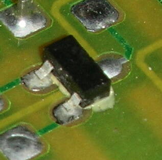 SMD-Transistor, aufgelötet auf Leiterplatte, um 1988